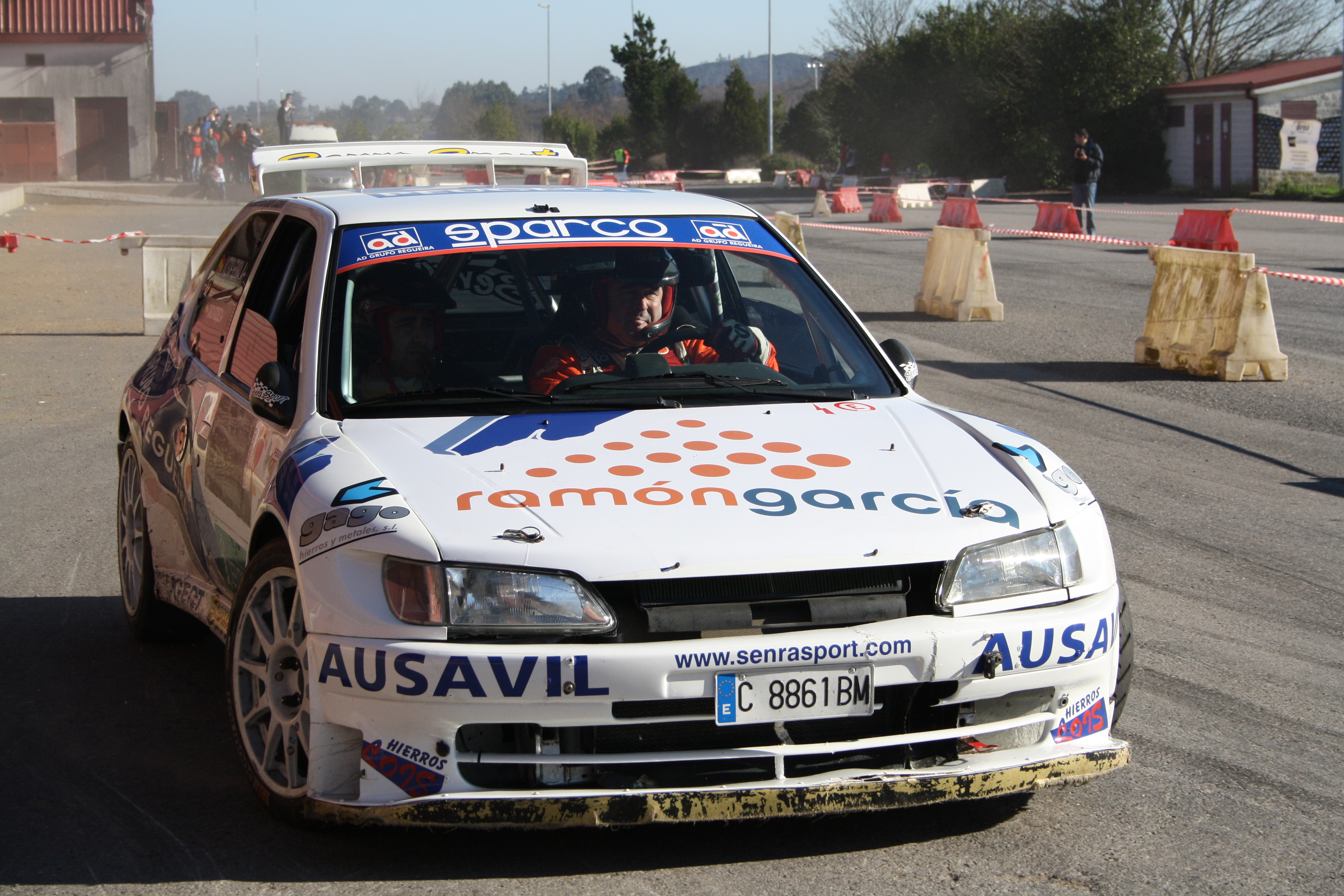 1º Master de Campeones de Galicia. Recinto Ferial de Amio. Año 2012